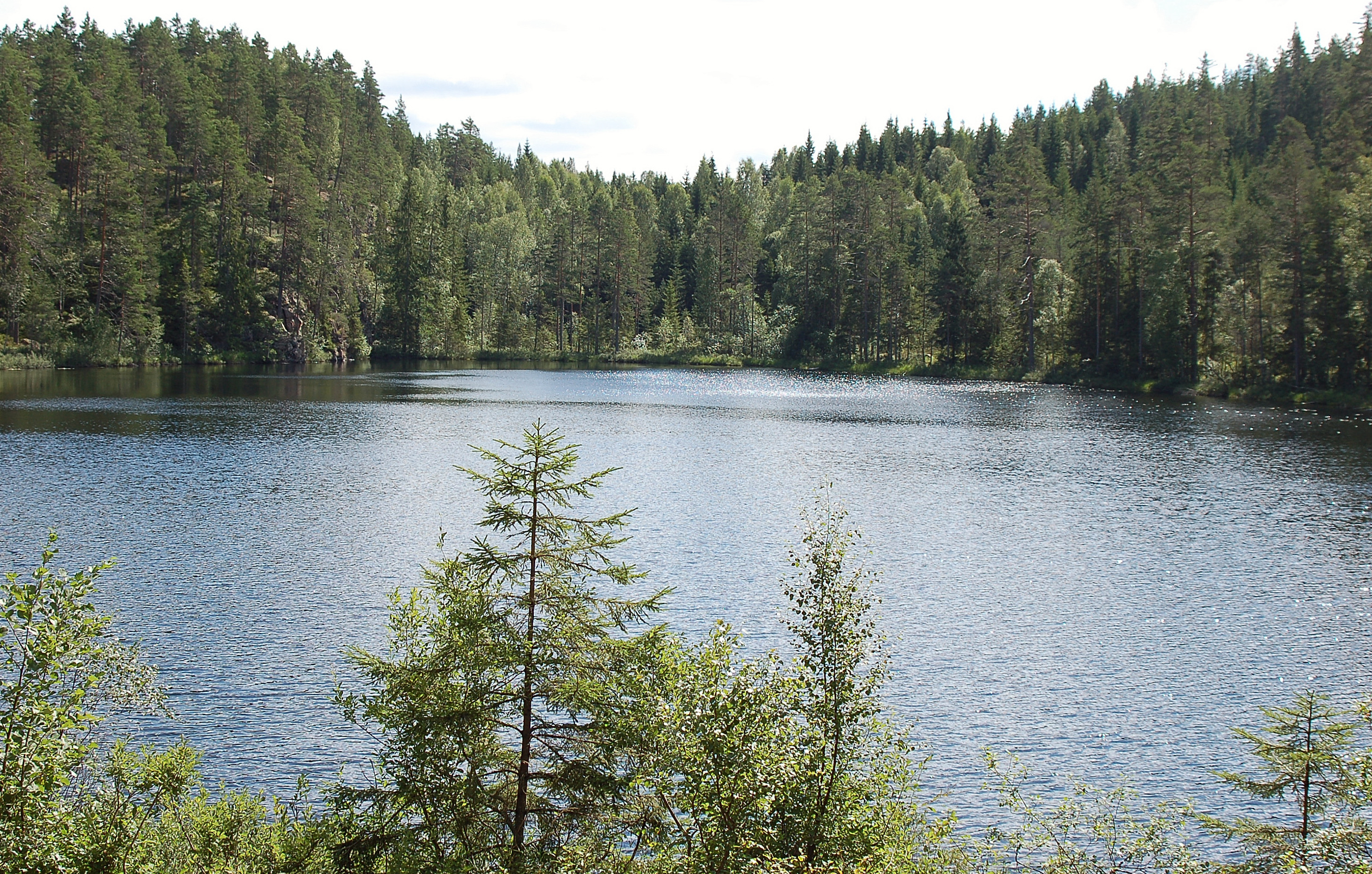 Bergstjärnet är en sjö inom Glaskogens naturreservat i Arvika kommun.